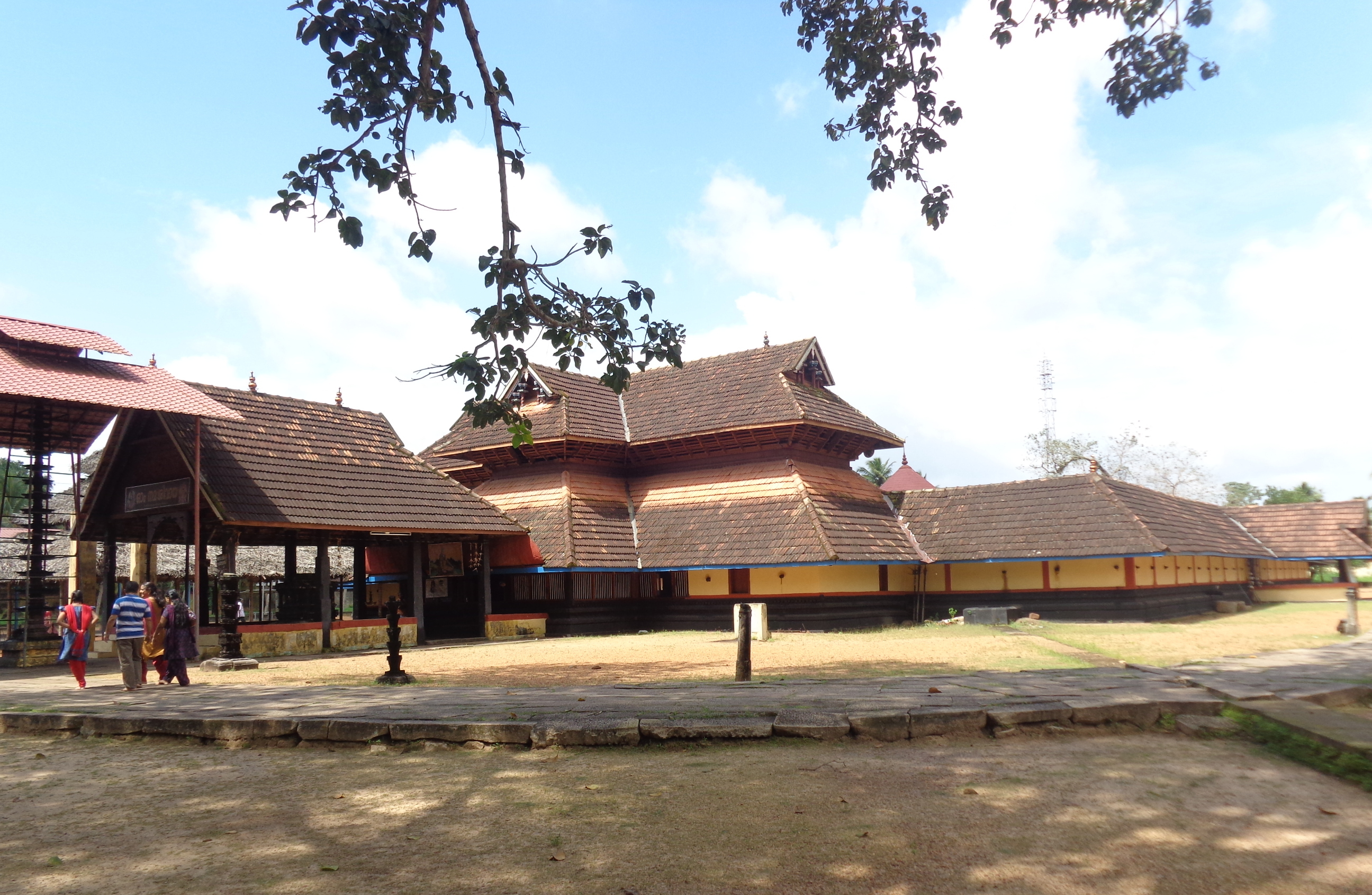 trkkurutti temple, mannar